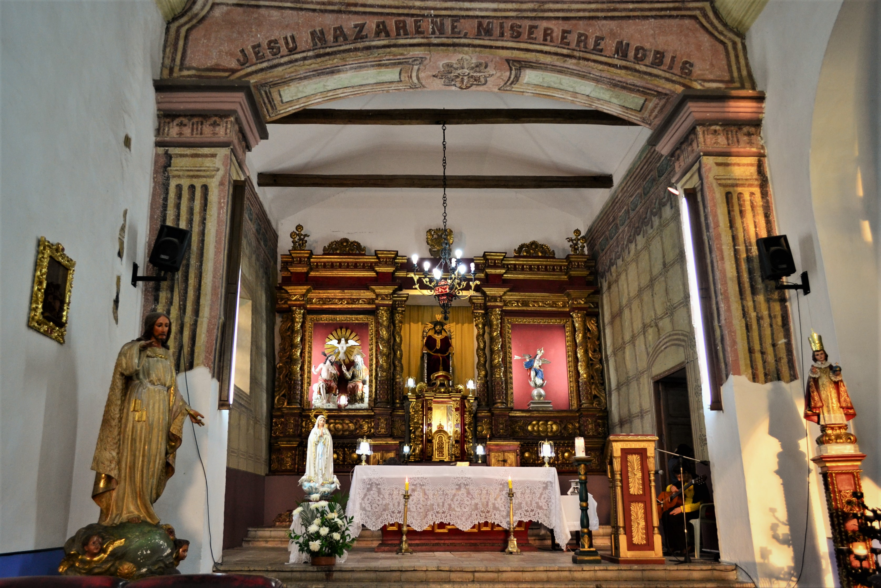 Altar mayor de la Ermita de Jesús Nazareno, retablo tallado en madera y decorado con pan de oro. Allí se encuentra ubicada la escultura del Amo Jesús, traída desde Italia en el siglo XVI.